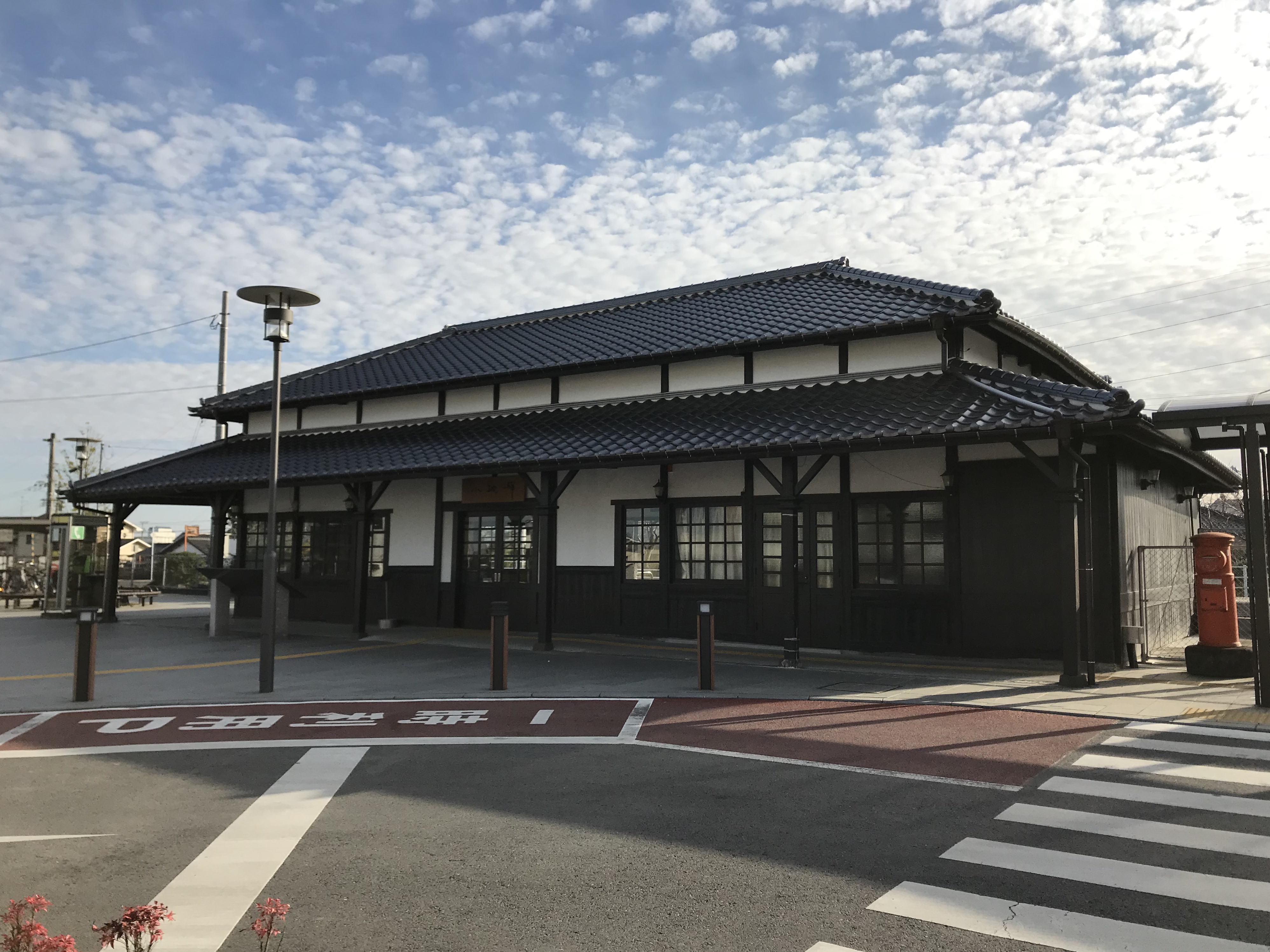 小城駅駅舎